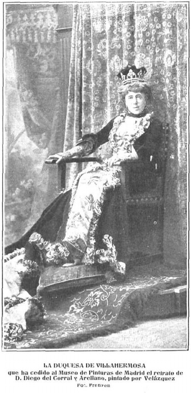 Duquesa de Villahermosa; fotografía de Franzen